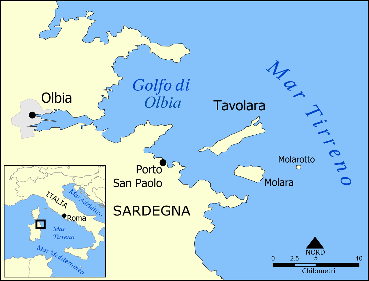 Tradotto dalla versione inglese